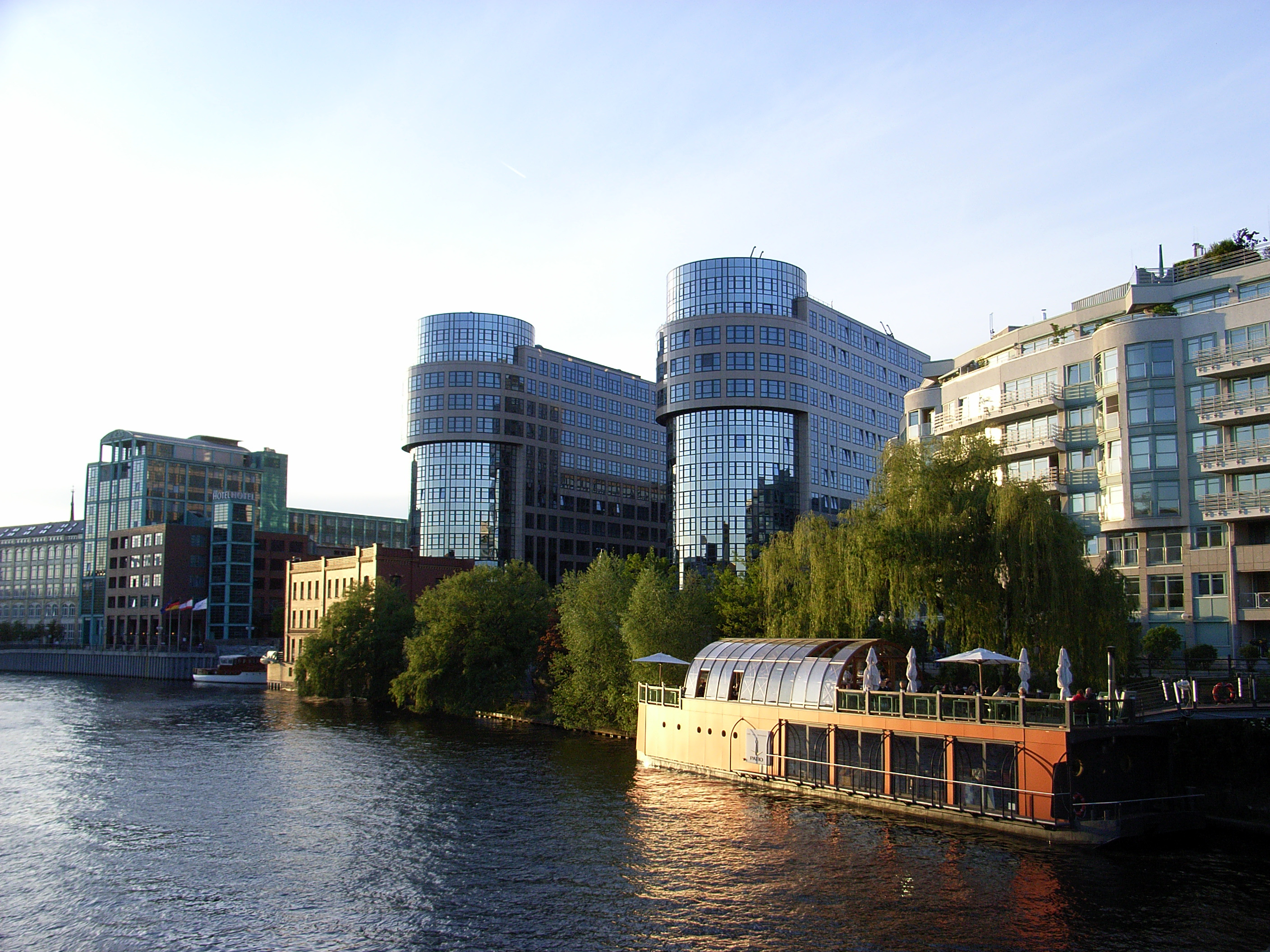 Dieses Bild zeigt das Bundesministerium des Innern in Berlin.